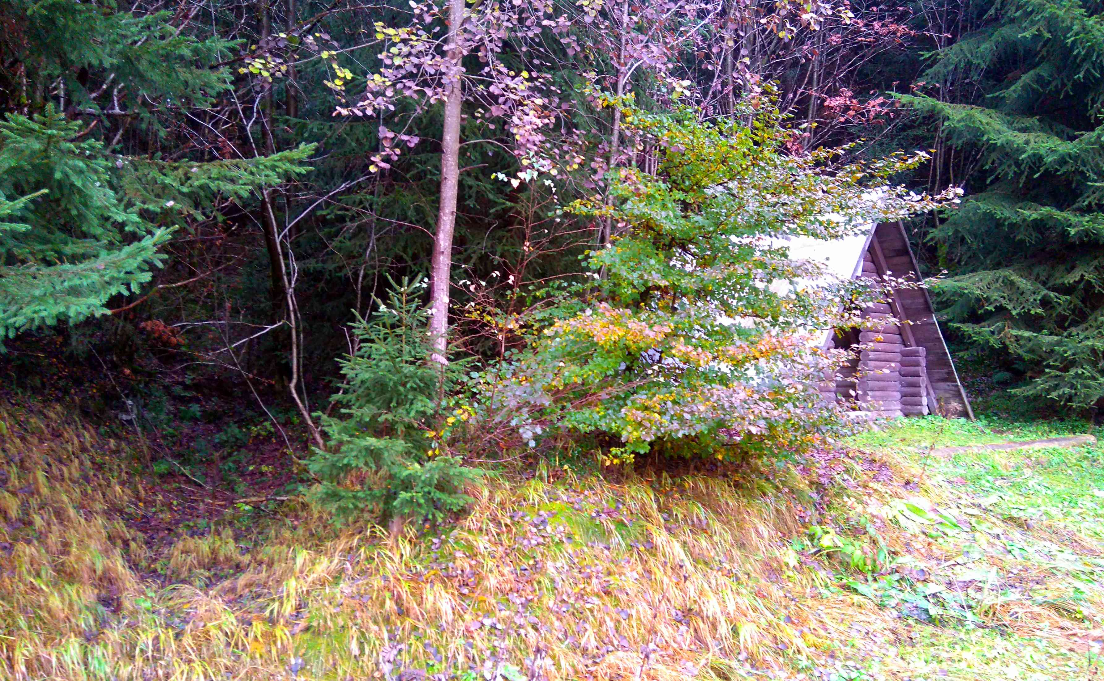 Früherer Überlauf des Pechöfer Grabens